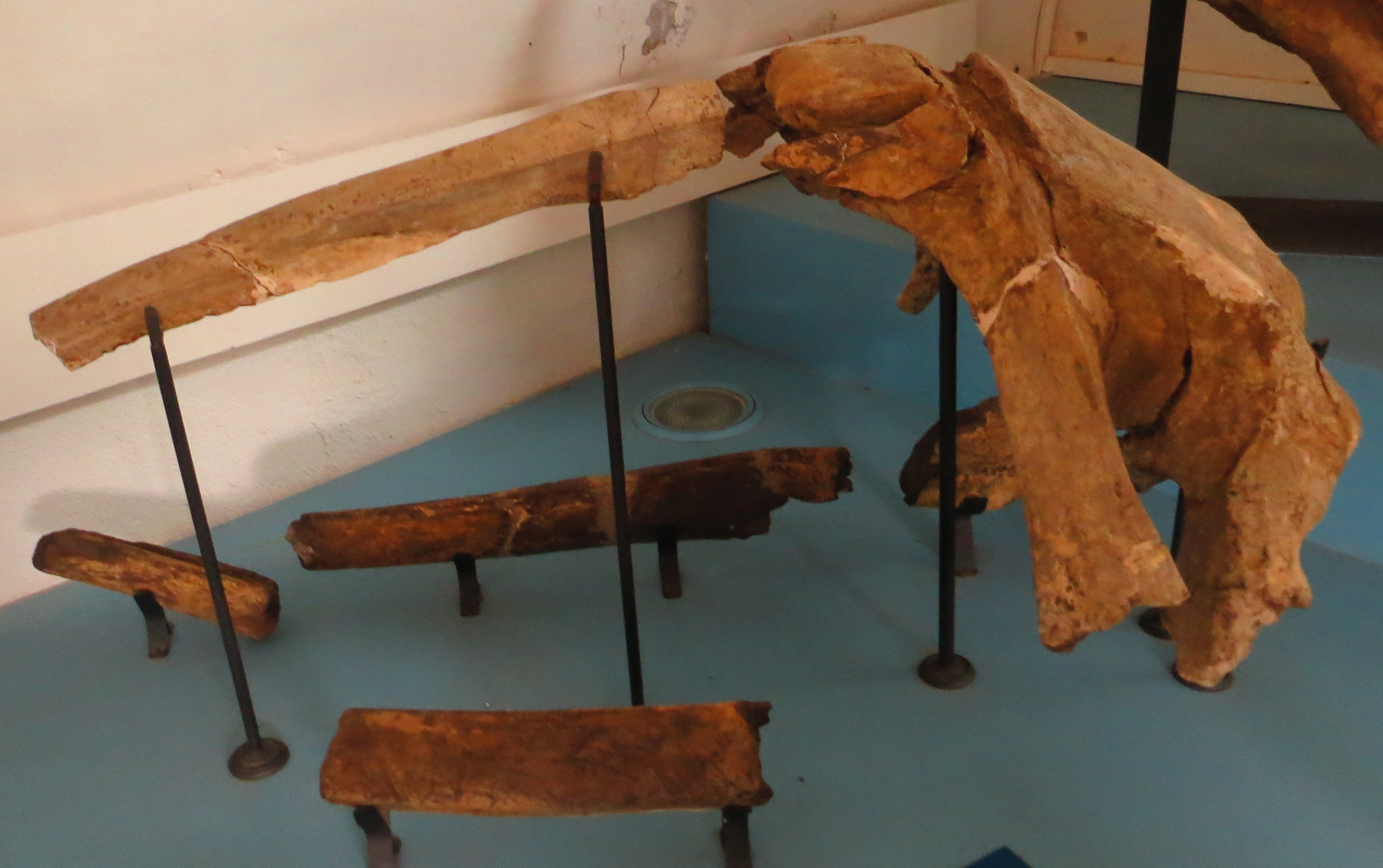 Fossil - Took the picture at Museo di Storia Naturale di Calci - Pisa